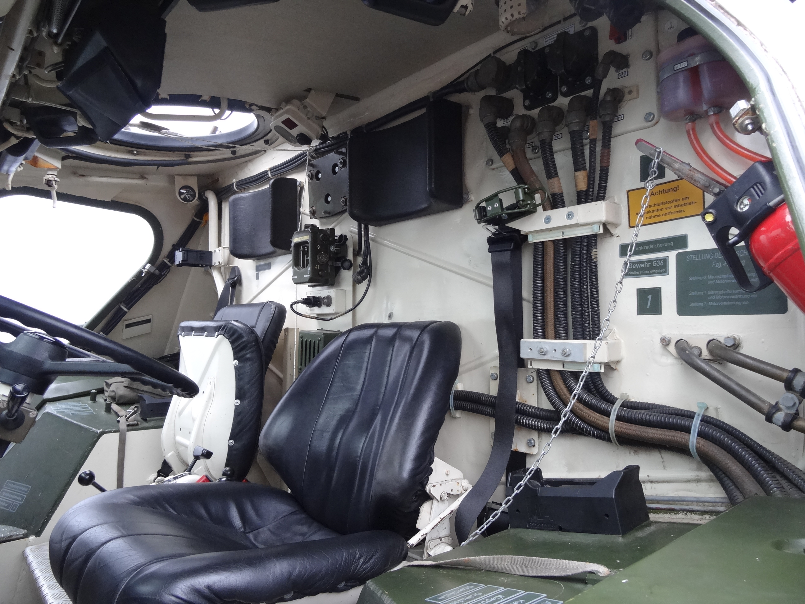 TPz Fuchs Fahrerstan